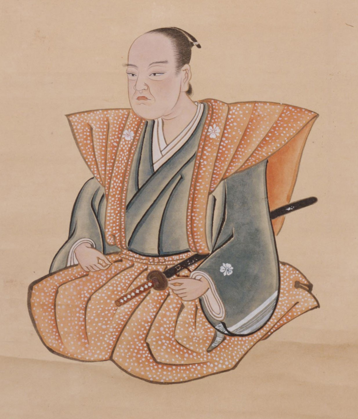 酒井忠世の肖像(部分)。